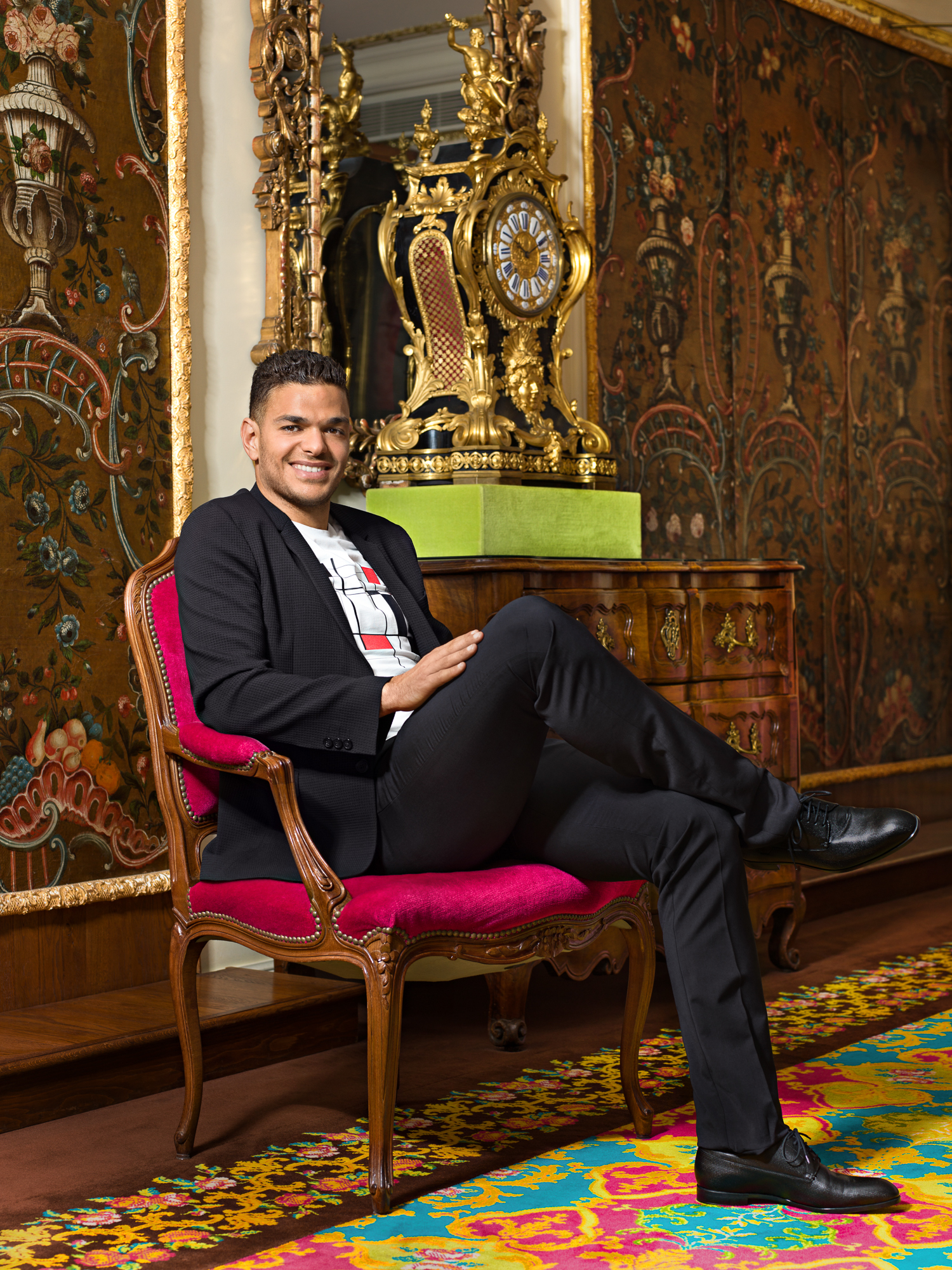 Hatem Ben Arfa photographié par son ami Gil Zetbase